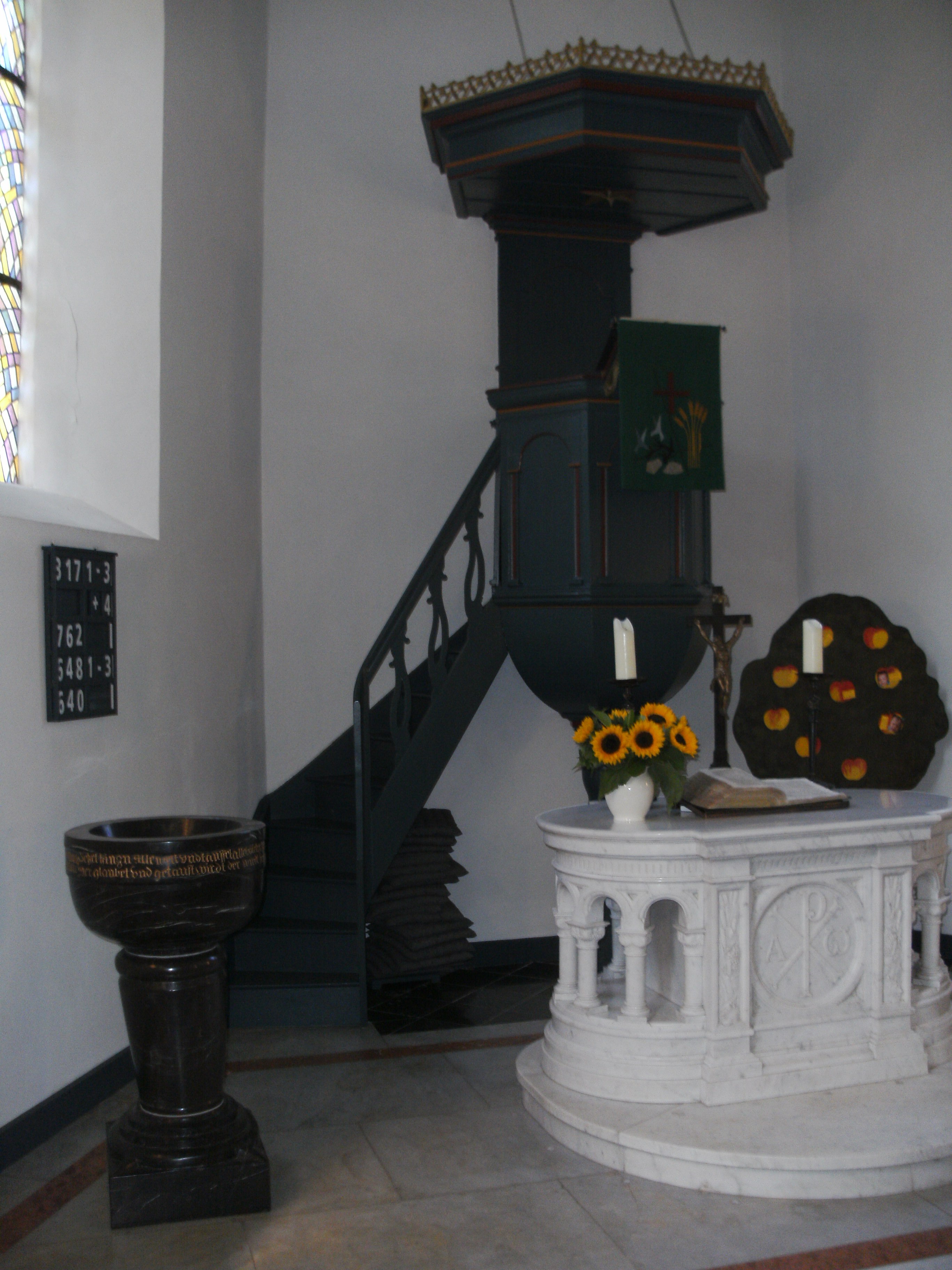 Bilder aus dem Innenraum der Kirche